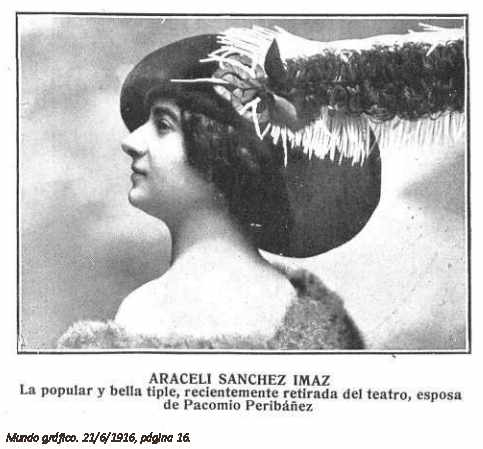 Araceli Sanchez Imaz